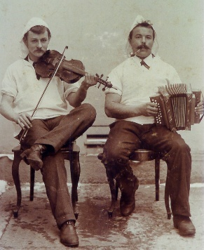 Gigler Blum und Josef Stump, die öfters miteinander Musizierten. Blum zahlte Stump ein Schwyzerörgeli, weil dieser kein Geld hatte und dieser bezahlte es mit dem Zusammenspielen fortlaufend ab.